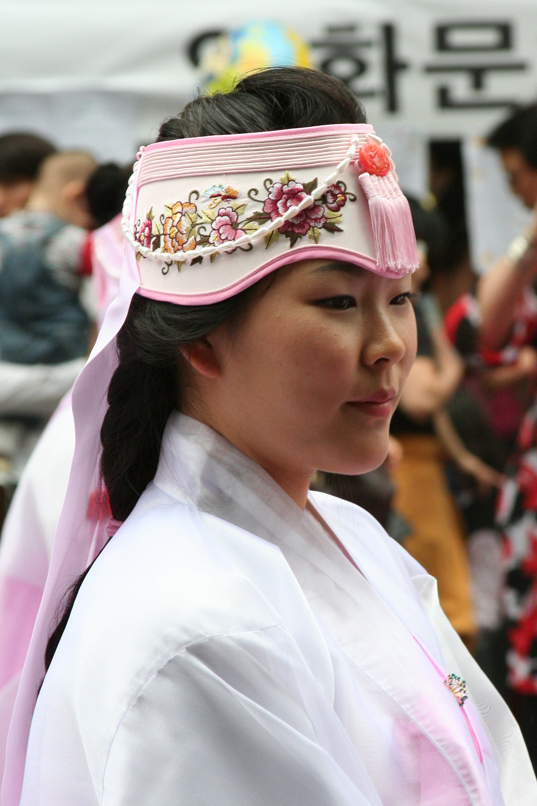 Ayam